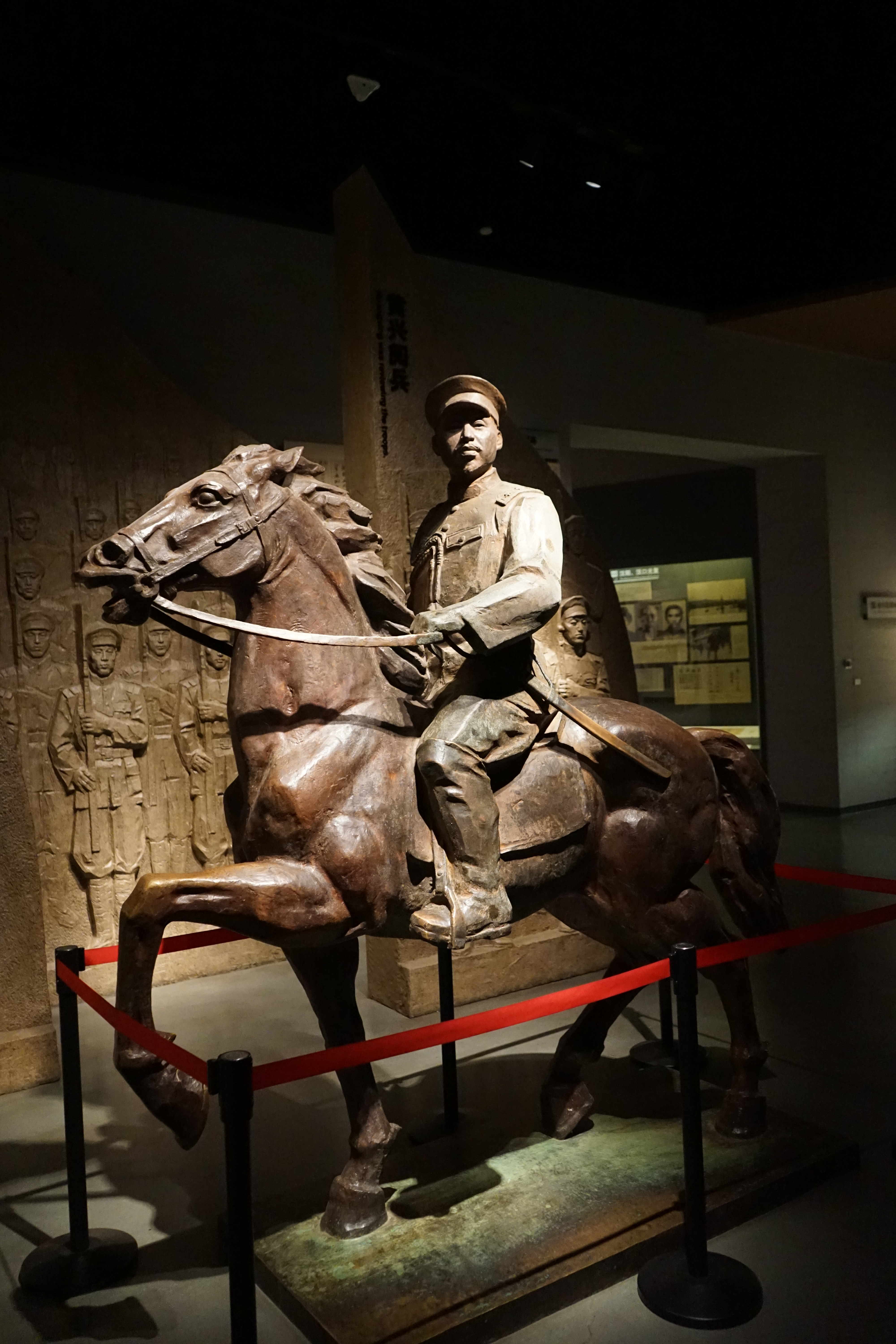 黄兴阅兵像，辛亥革命博物馆第四展厅